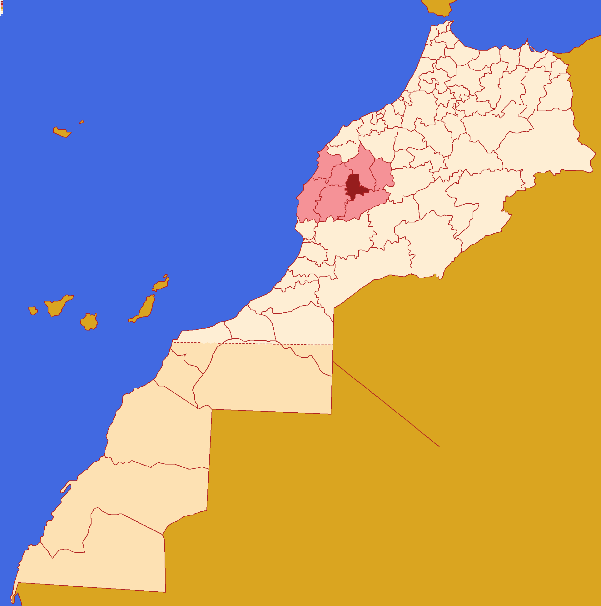 Localização da Prefeitura de Marraquexe ,dentro da região de Marraquexe-Safim e dentro de Marrocos. Conforme a reforma administrativa de 2015.